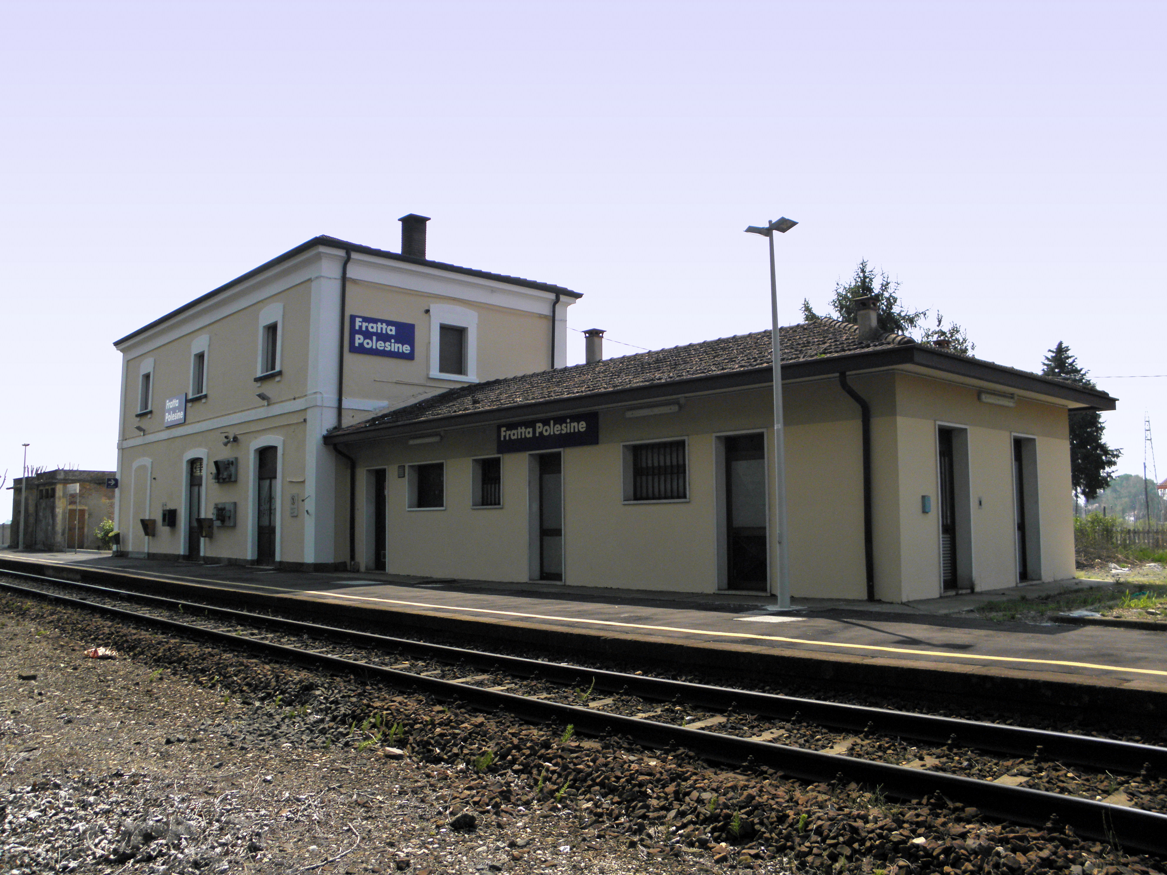 Fratta Polesine: il piazzale binari della stazione ferroviaria di Fratta.